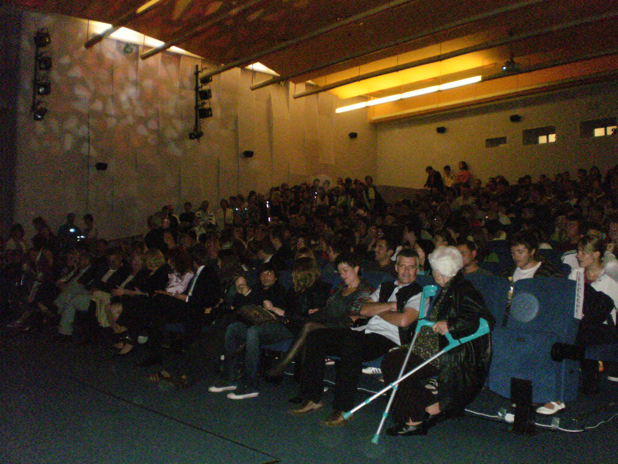 Vyhlasovanie cien na filmovom festivale Cinematik 2010.